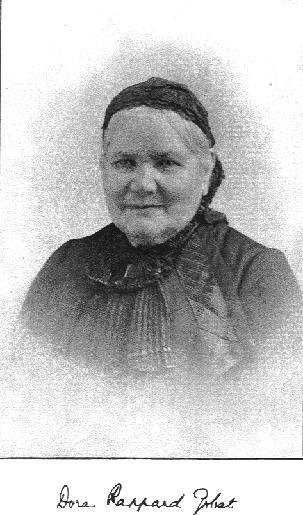 Wahrscheinlich gemeinfrei durch Alter. Photograph, sofern bekannt, muss allerdings vor 1936 vestorben sein (Stand: 2006).